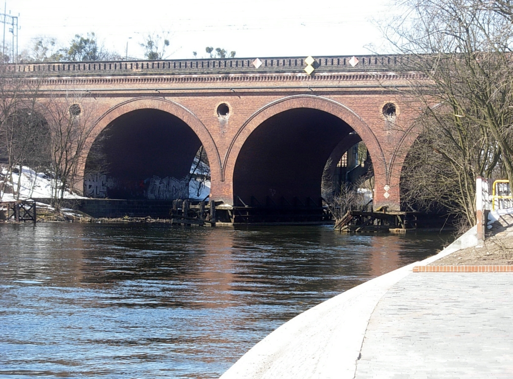 Mosty kolejowe w Bydgoszczy, zbud. w 1851 r. Widok z bulwaru nad Brdą